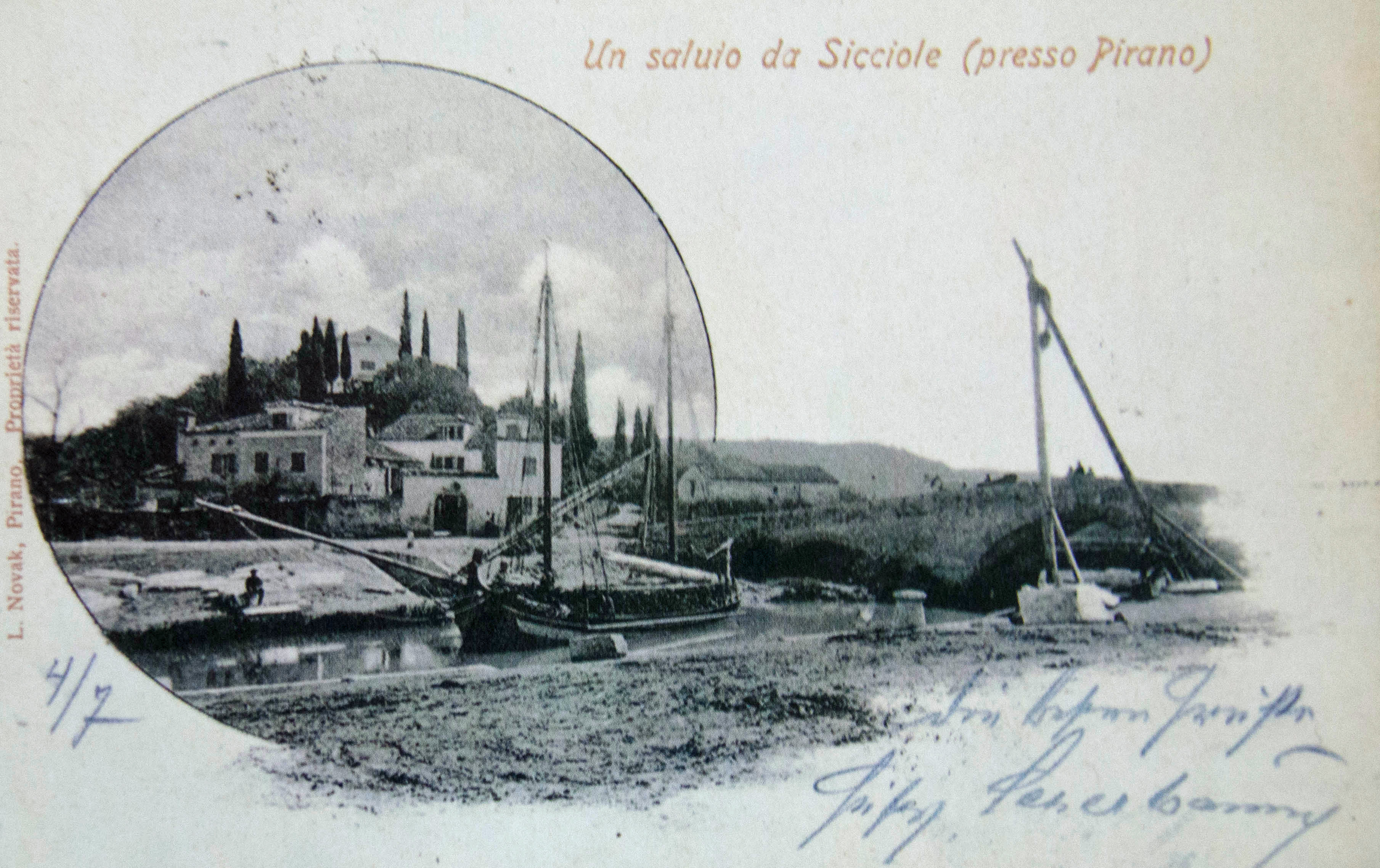 Razglednica Sečovelj.